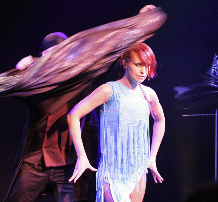 Die Verwandlungskünstler Sos und Victoria Petroysn